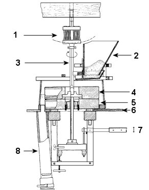 Mahlgang